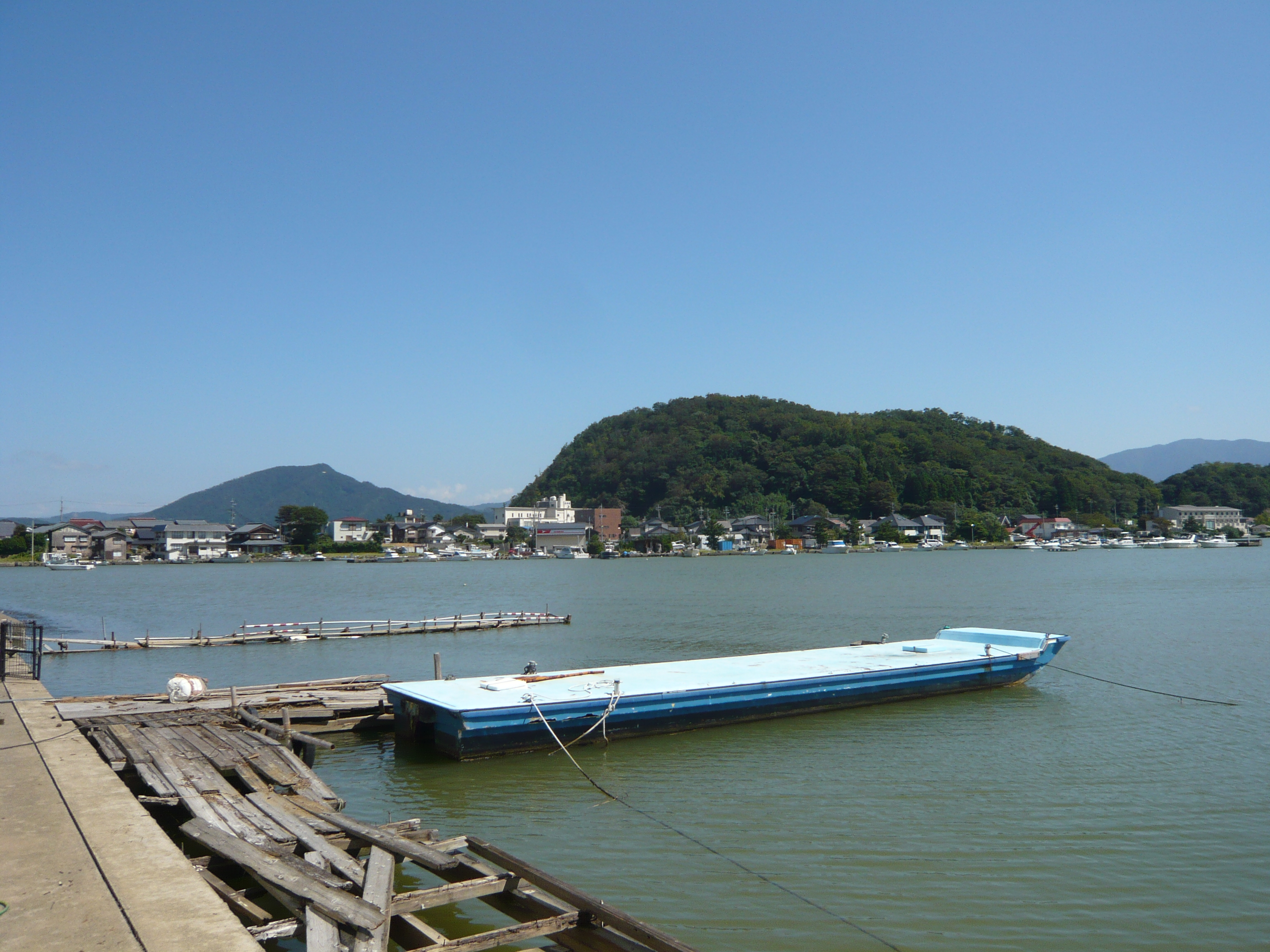 遊覧船乗り場と早瀬集落